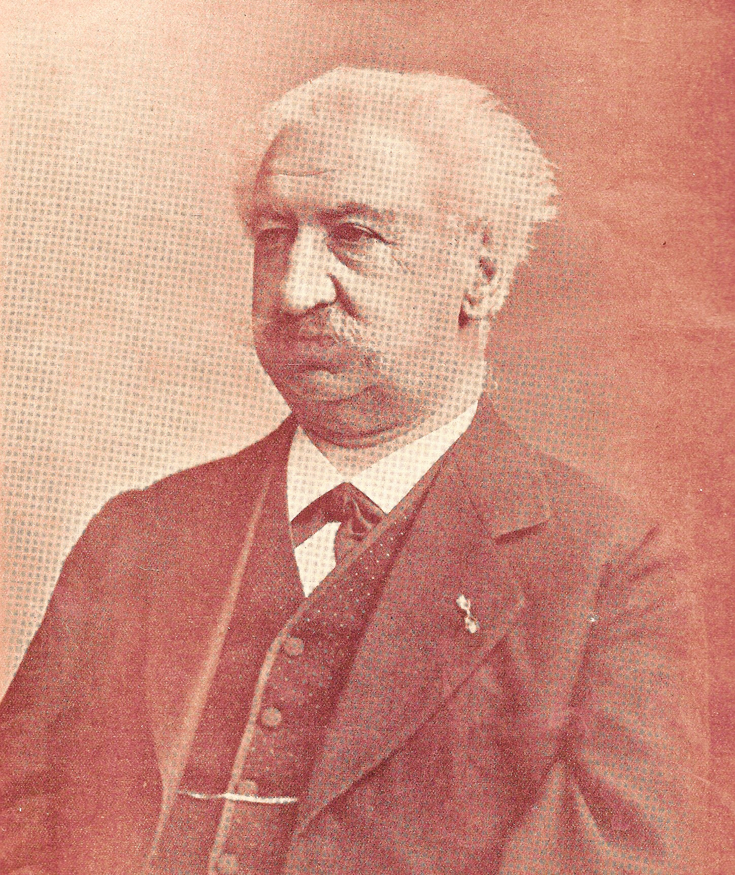 Prof. Dr. J.J Hartman